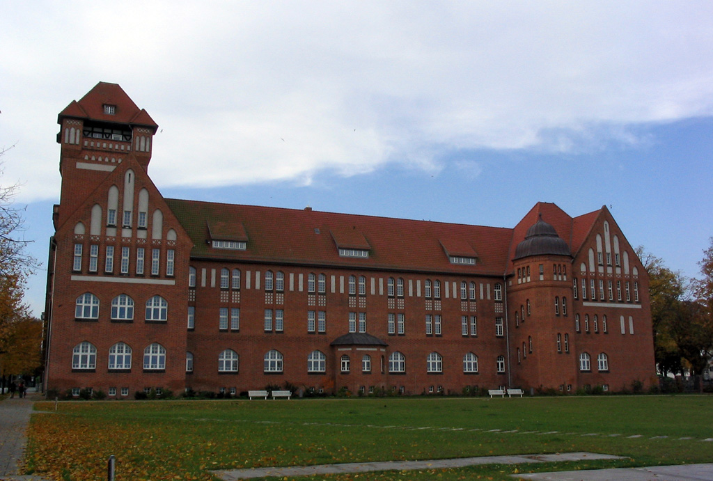 Beschreibung: Hansa-Gymansium Stralsund Fotograf: Darkone, 25. Oktober 2004